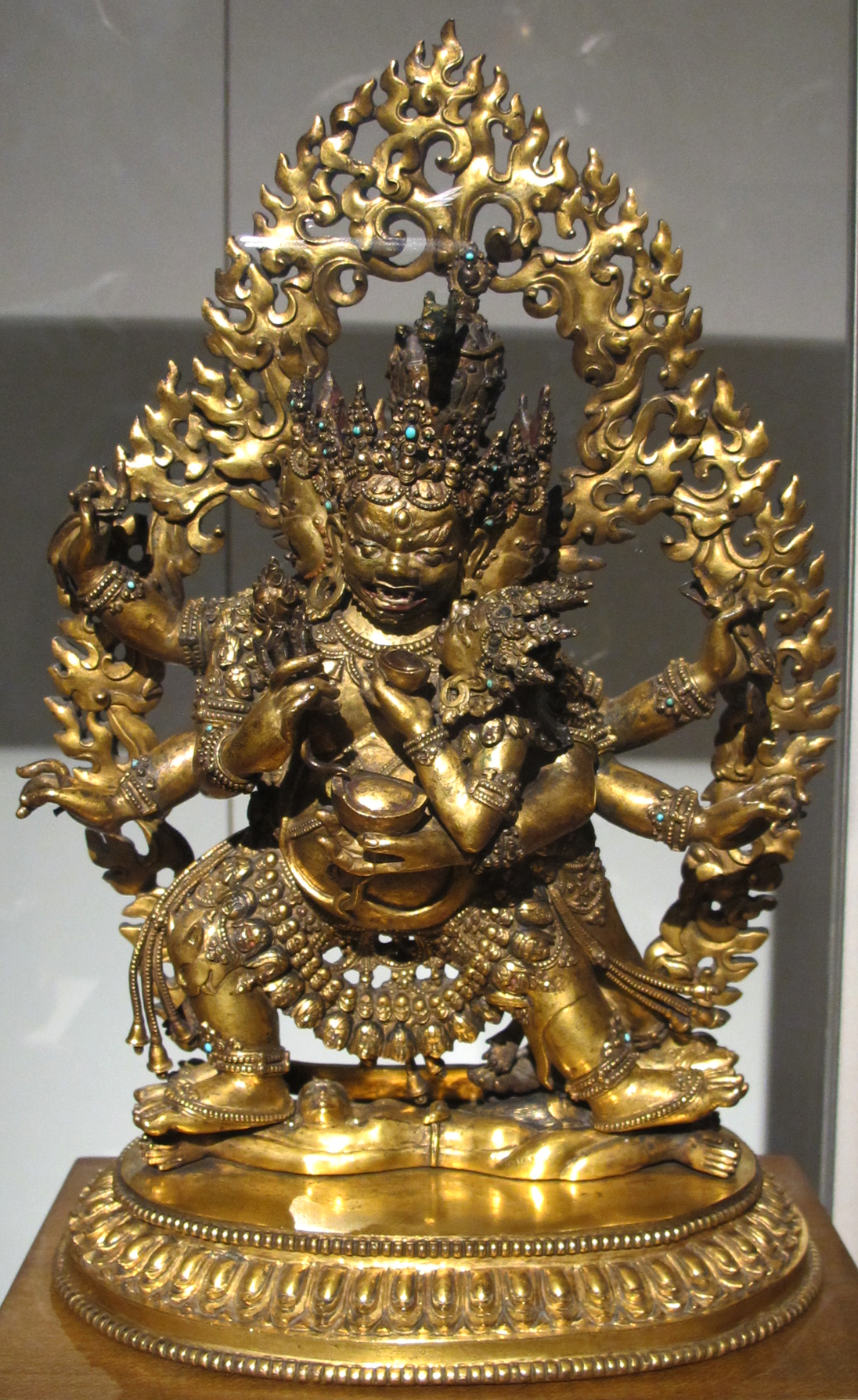 Tibet, hayagriva, xviii sec